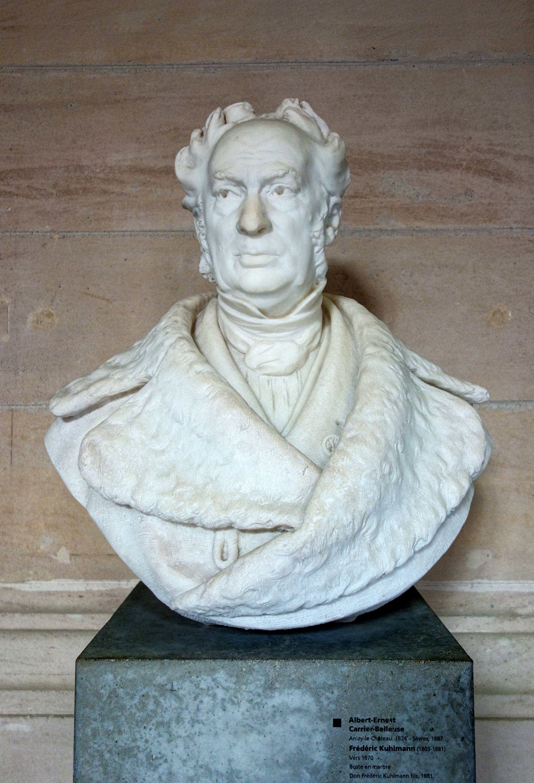 Frédéric Kuhlmann par Albert-Ernest Carrier-Belleuse au Palais des Beaux-Arts de Lille.